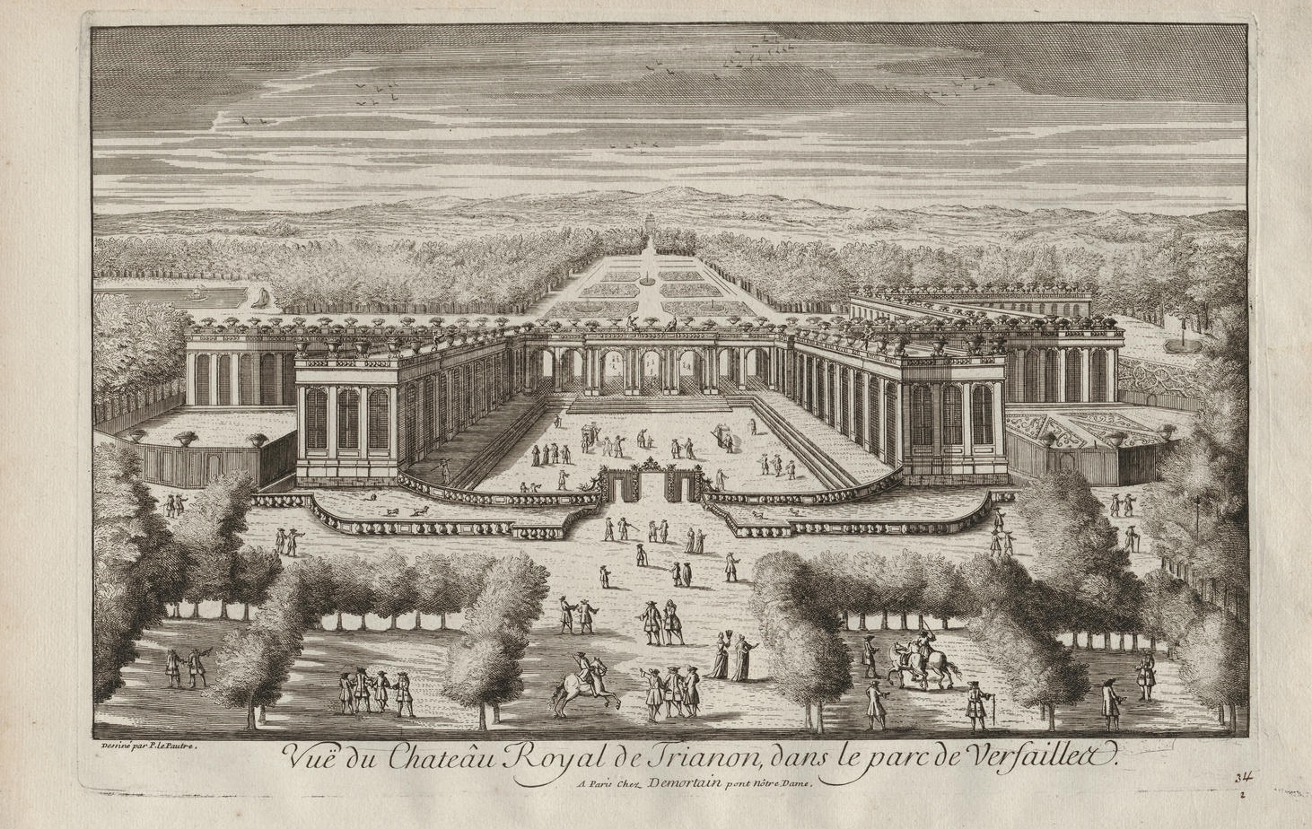 Vue du Chateâu Royal de Trianon dans le parc de Versailles (sic)